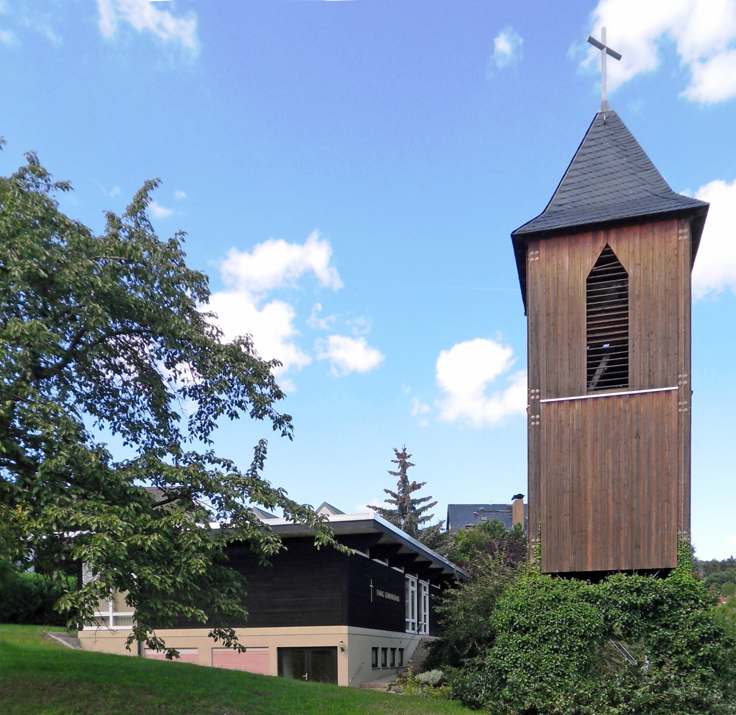 Evangelisches Gemeindehaus in Wiesbaden-Heßloch am Jagdweg, Blick von Süden.